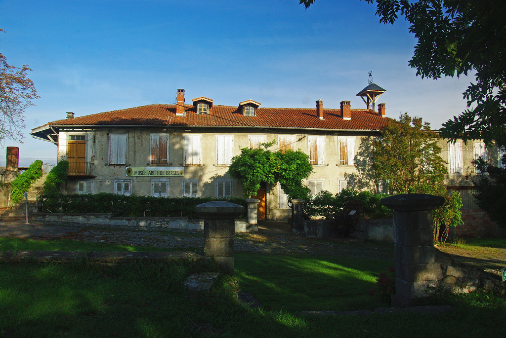 Aristide Bergès est né dans cette maison en 1833, dans une famille de papetiers. Ingénieur hydraulicien, il est considéré comme le père de la "houille blanche.